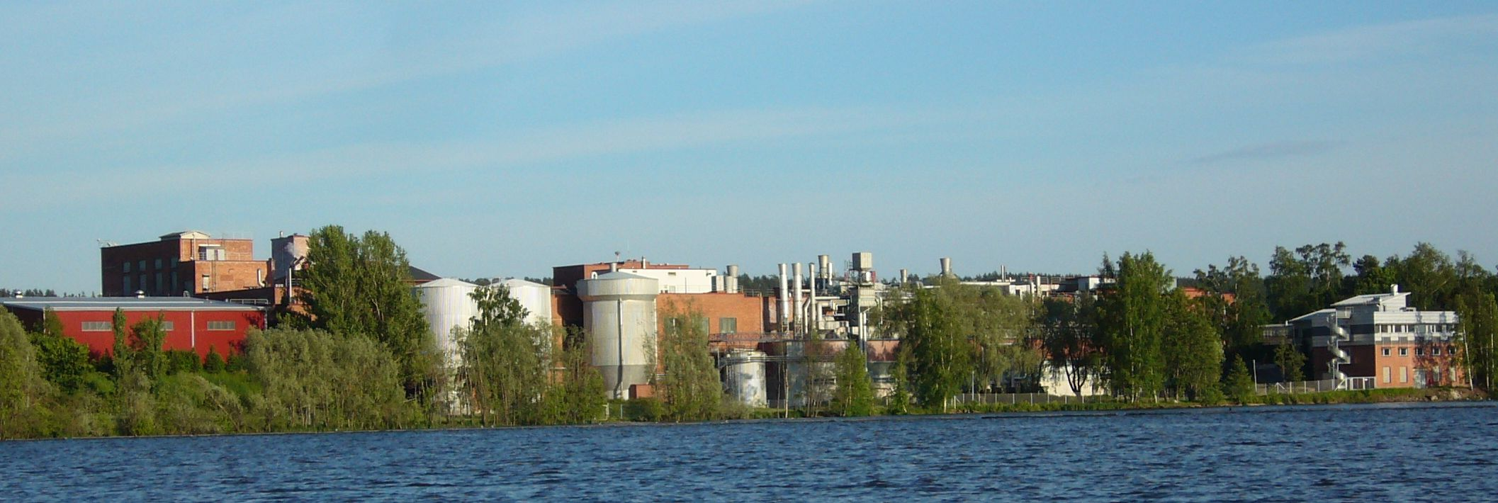 Lohjan paperitehdas Lohjan Pitkäniemessä. Valokuvattu Lohjanjärveltä kesällä 2006. / Loparex paper mill at Lohja. Photograph taken from Lake Lohja.